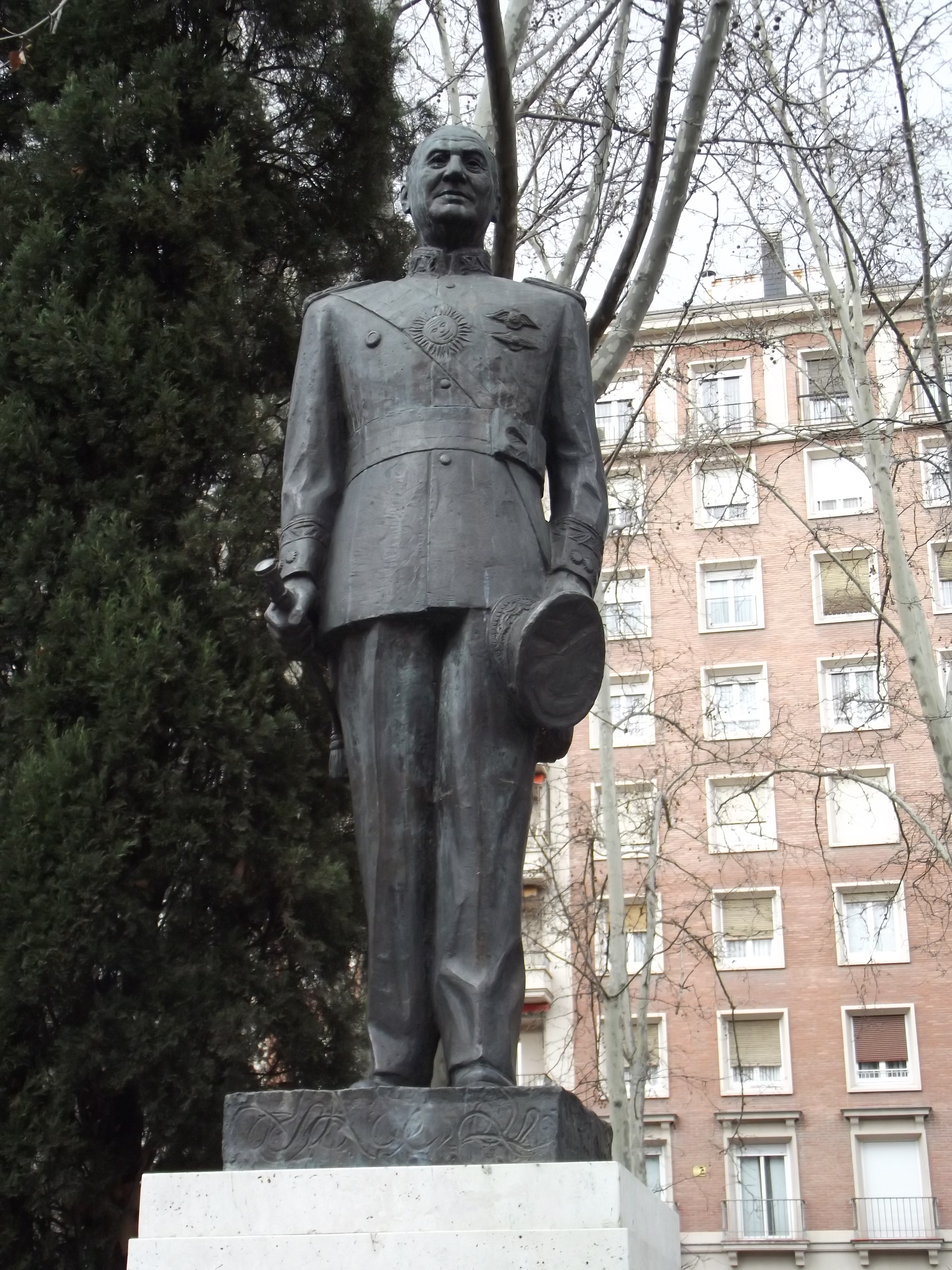 Estatua de Juan Domingo Perón, Madrid, España